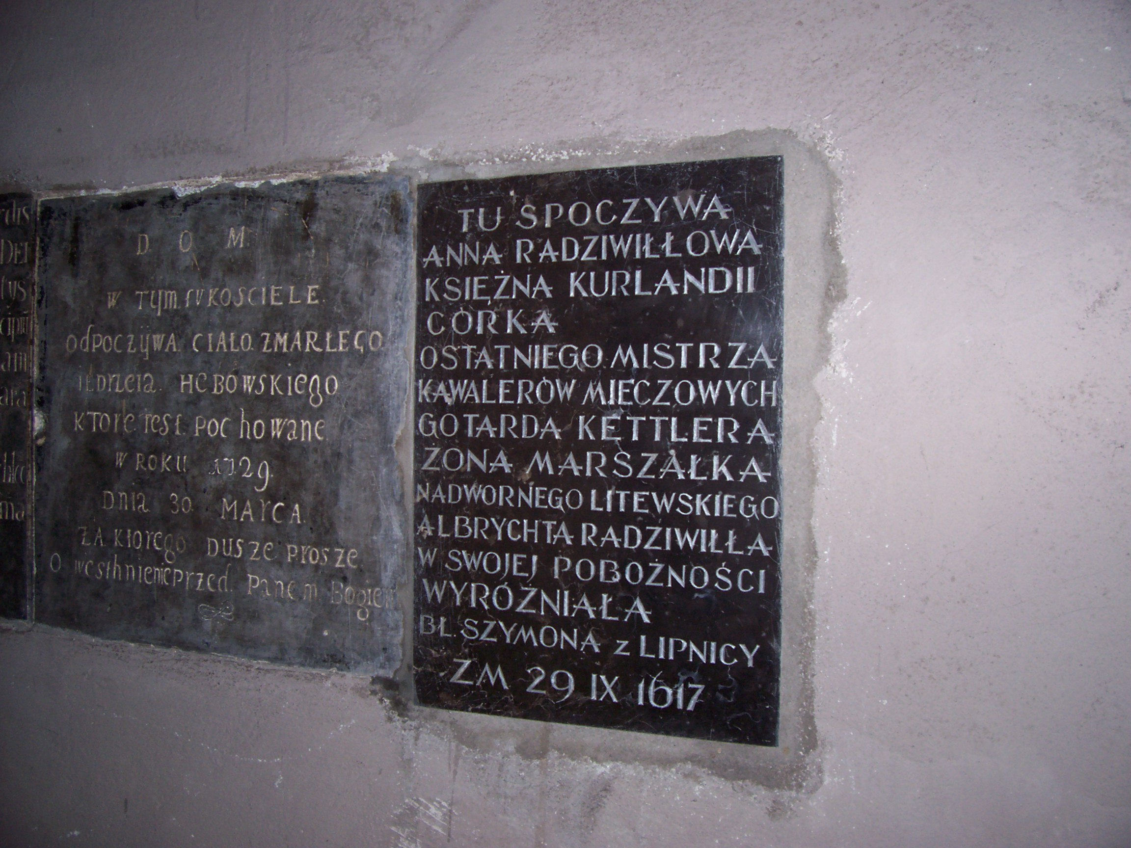 Tablica nagrobna Anny Radziwiłłówny w krakowskim kościele oo. bernardynów na Stradomiu